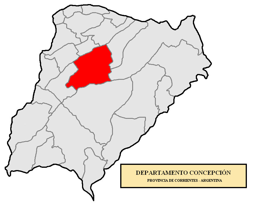 Localización del Departamento Concepción en la provincia de Corrientes, Argentina Localización del Departamento Concepción, en la provincia de Corrientes, Argentina.